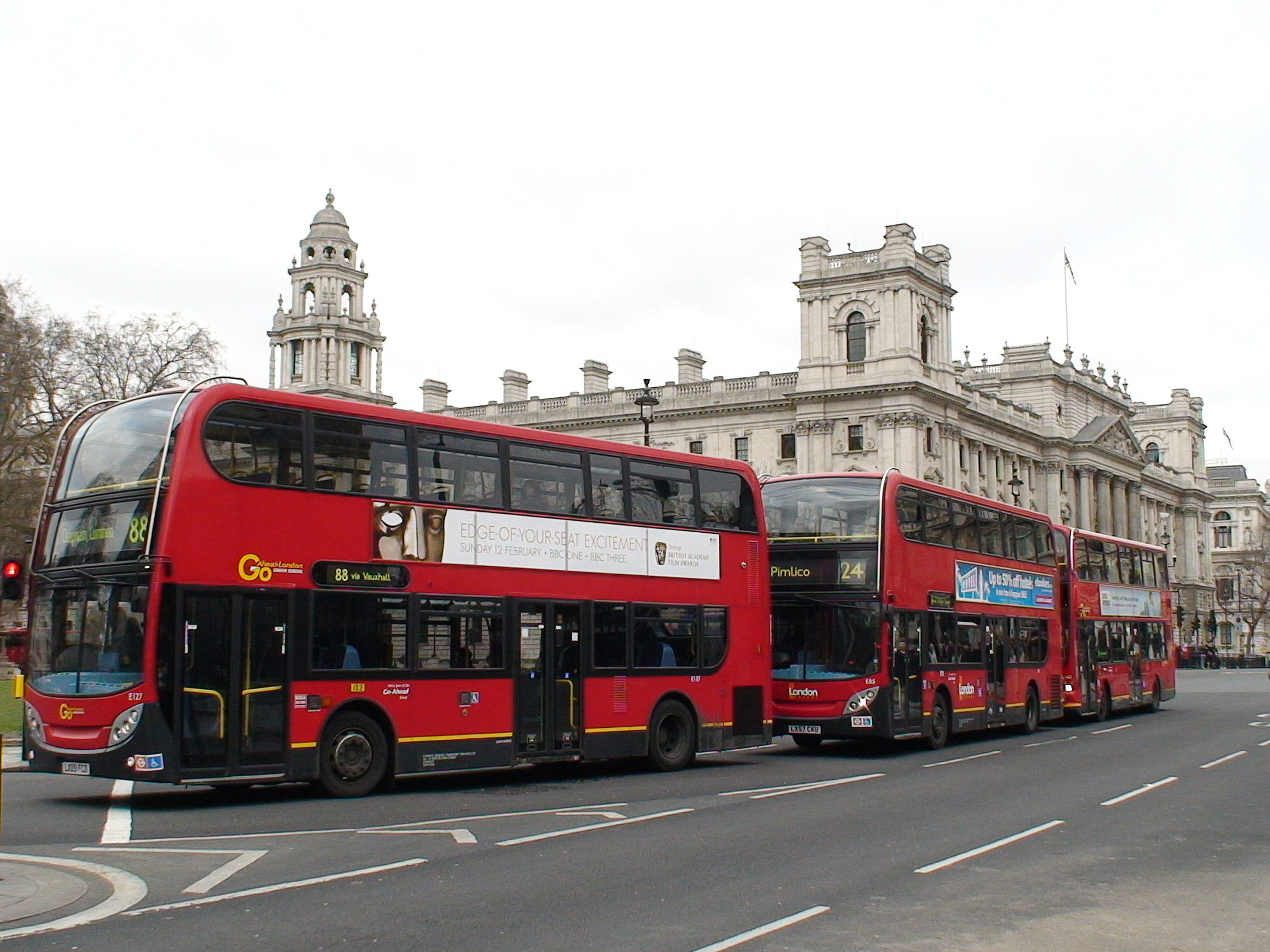 Двухэтажные лондонские автобусы "Даблдеккер", пришедшие на смену знаменитому "Рутмастеру", на улице Лондона